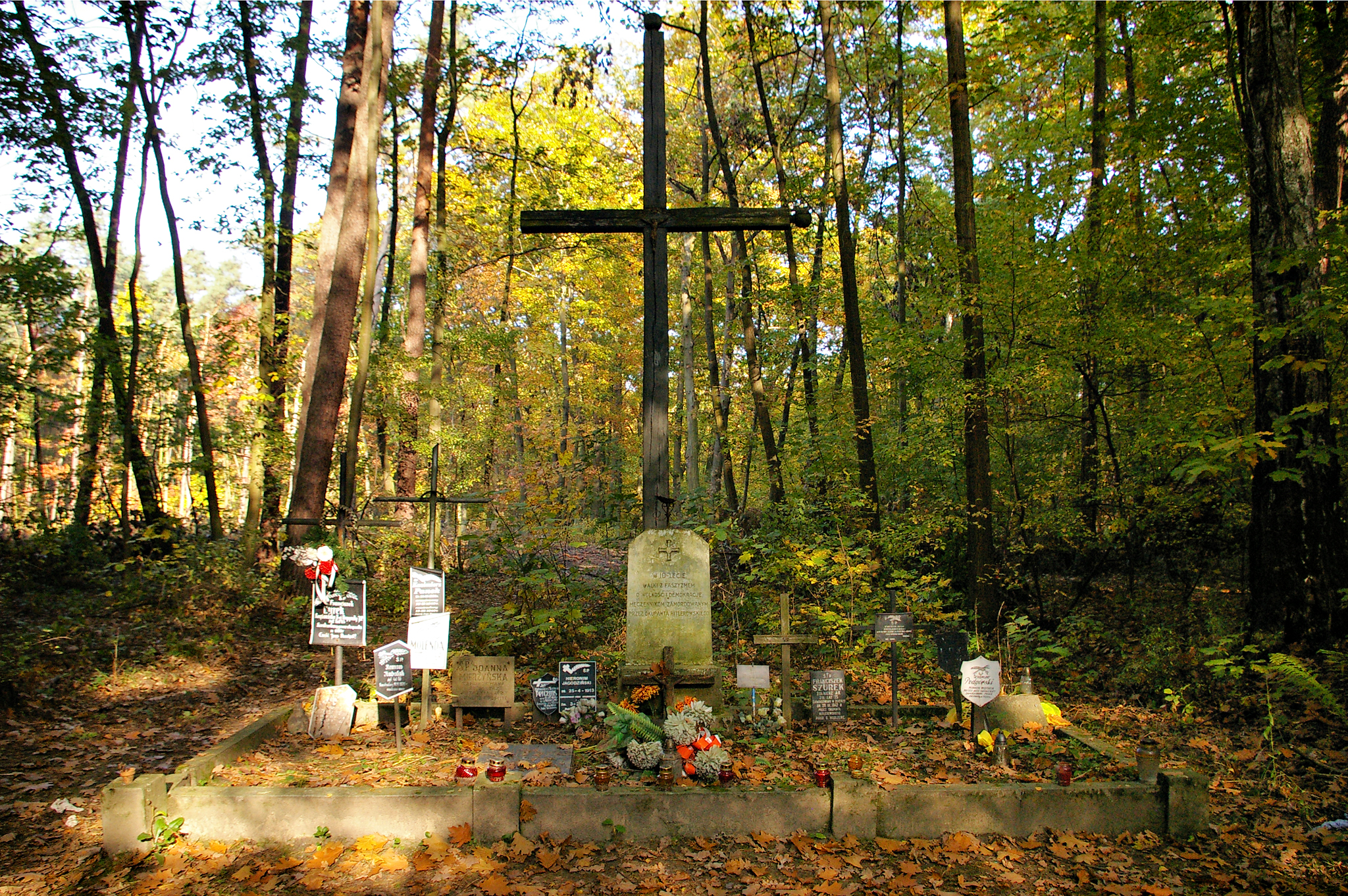 Pomnik w okolicy wsi Lućmierz-Las upamiętniający ofiary drugiej wojny światowej.